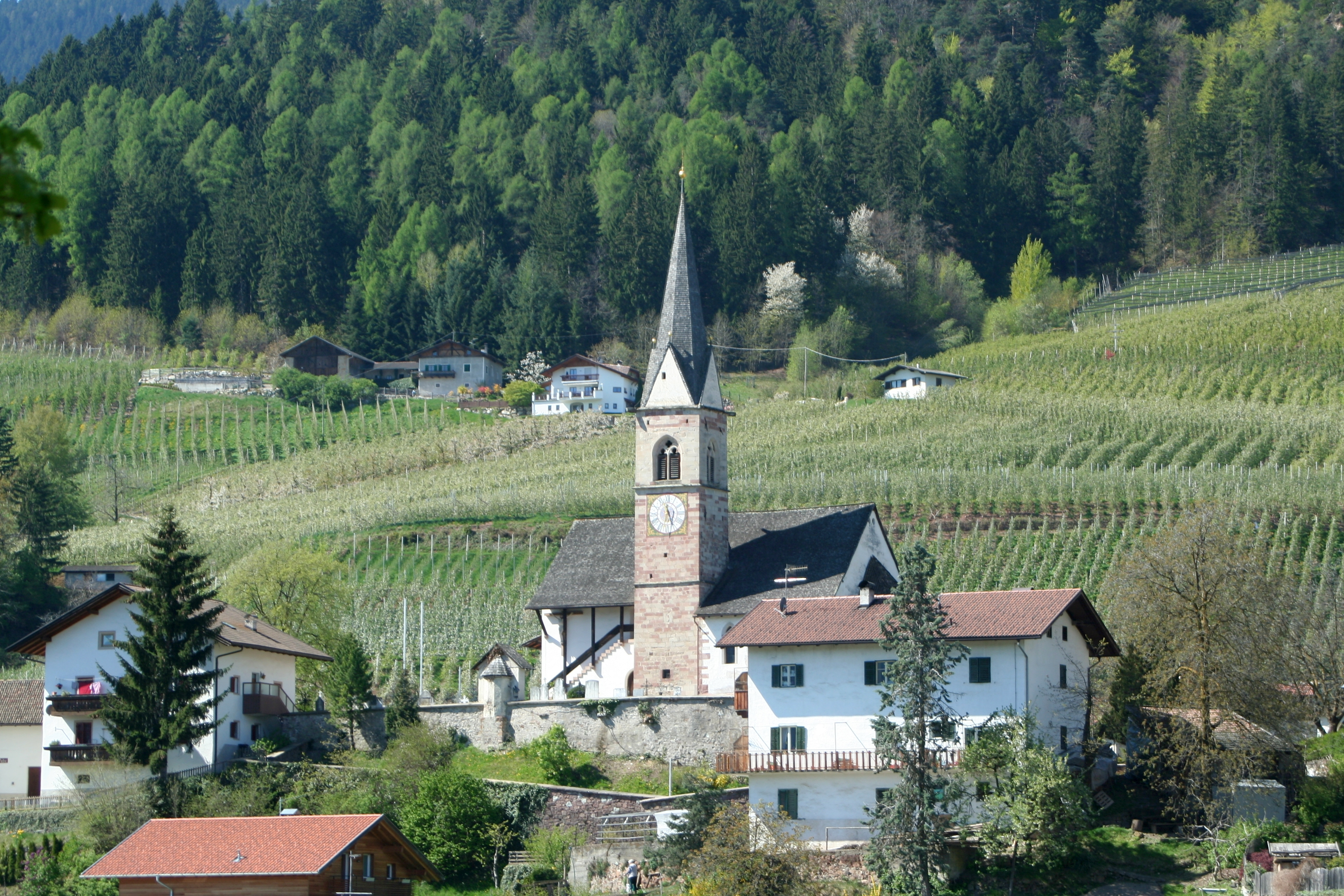 Pfarrkirche St. Severin mit Friedhof in Völlan